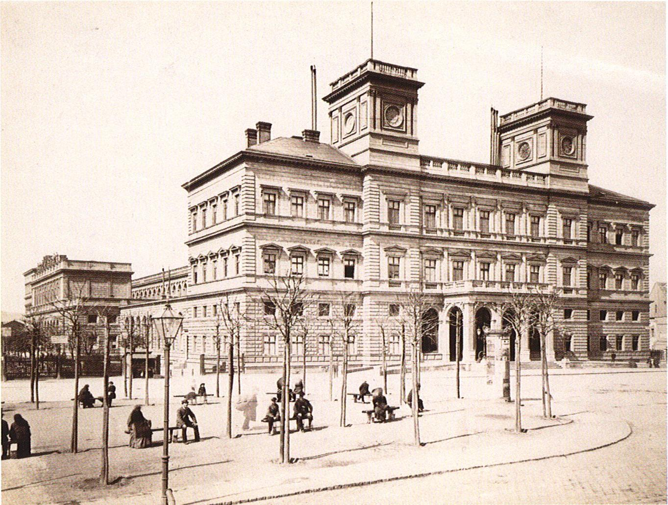 Kaiser Franz-Josefs-Bahnhof, Ansicht vom Althan-Platz und von der Althanstraße.